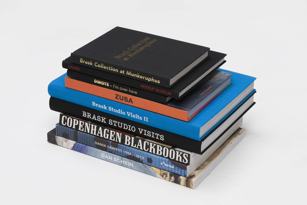 Brask Publications